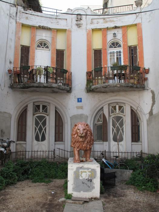 הארמון בסמטא פלונית